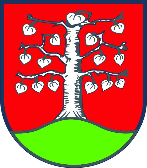 Wappen der Gemeinde Oederquart